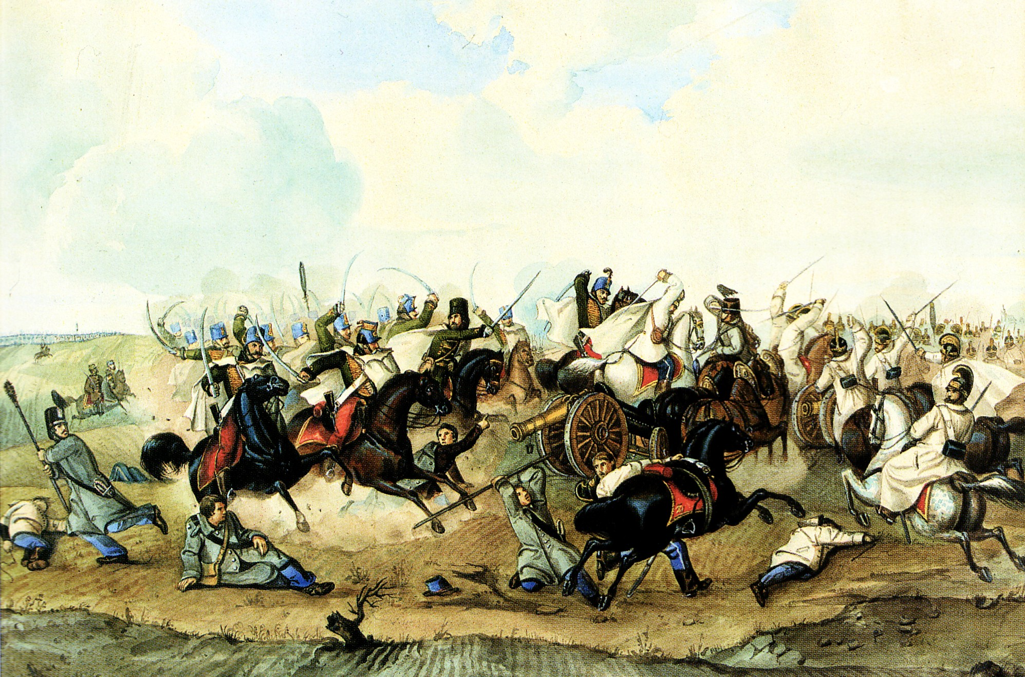 A verpeléti lovasharc 1849. február 27-én. Kápolnai csata, február 26–27. Than Mór festménye